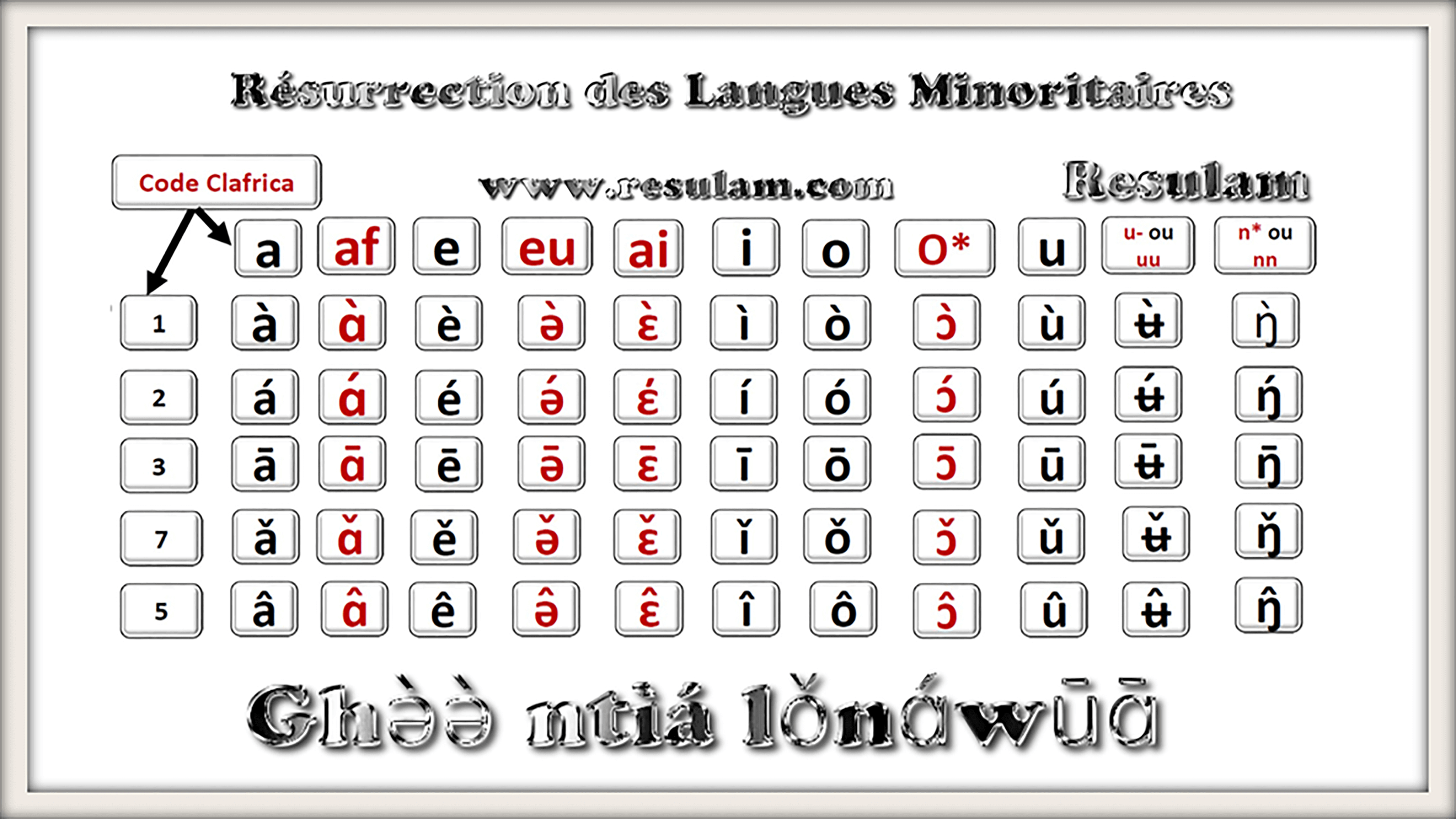 Alphabet General des Langues Camerounaises (AGLC)